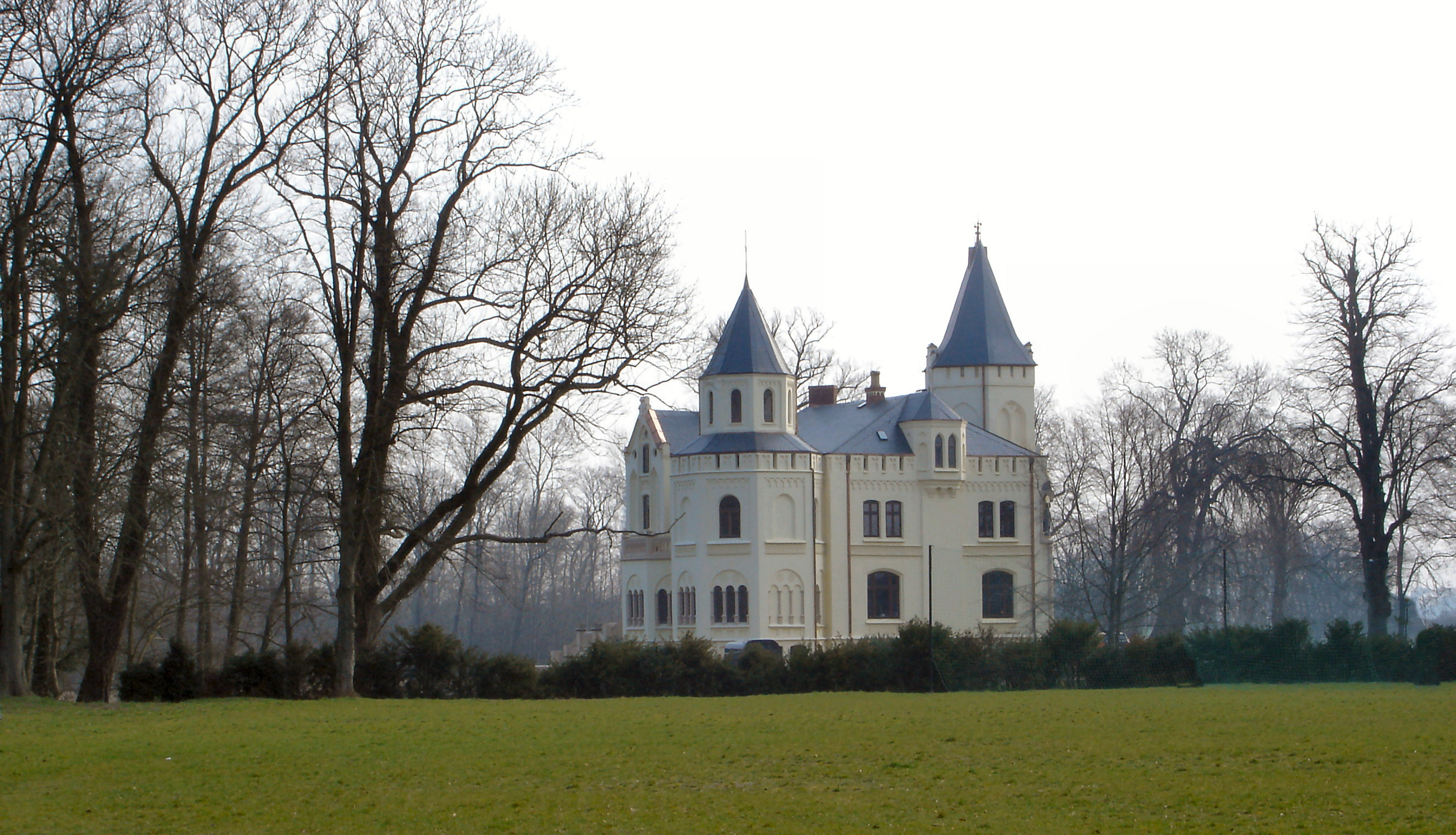 Schloss in Lützow / Castle in Lützow (Mecklenburg-Western Pomerania)